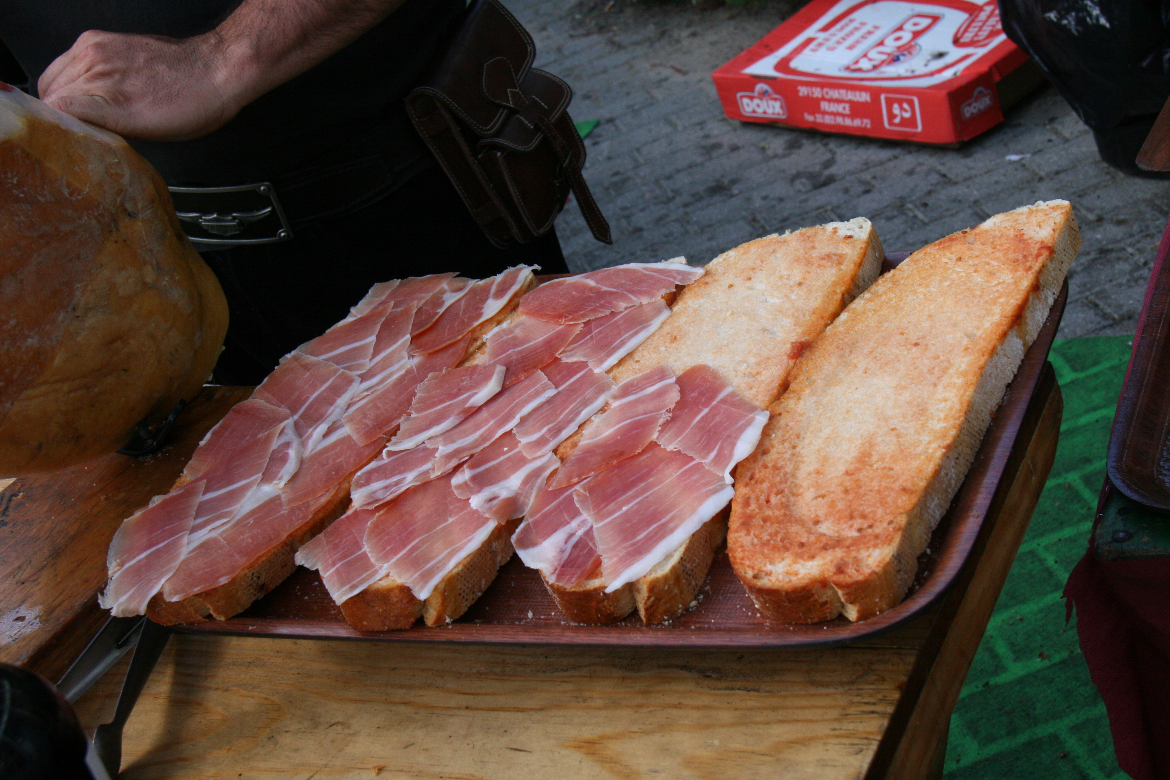 Tostas de jamón en preparación